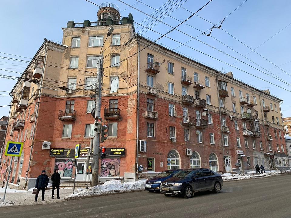 Дом № 45 по улице М. Горького в Ижевске, где жил и работал удмуртский писатель Г. Д. Красильников. Краси́льников Генна́дий Дми́триевич (7 июля 1928 года, с. Алнаши Алнашского района Удмуртской АССР, — 11 апреля 1975 года, г. Ижевск) — удмуртский писатель. Лауреат Государственной премии Удмуртской АССР. Член Союза писателей СССР (1957).